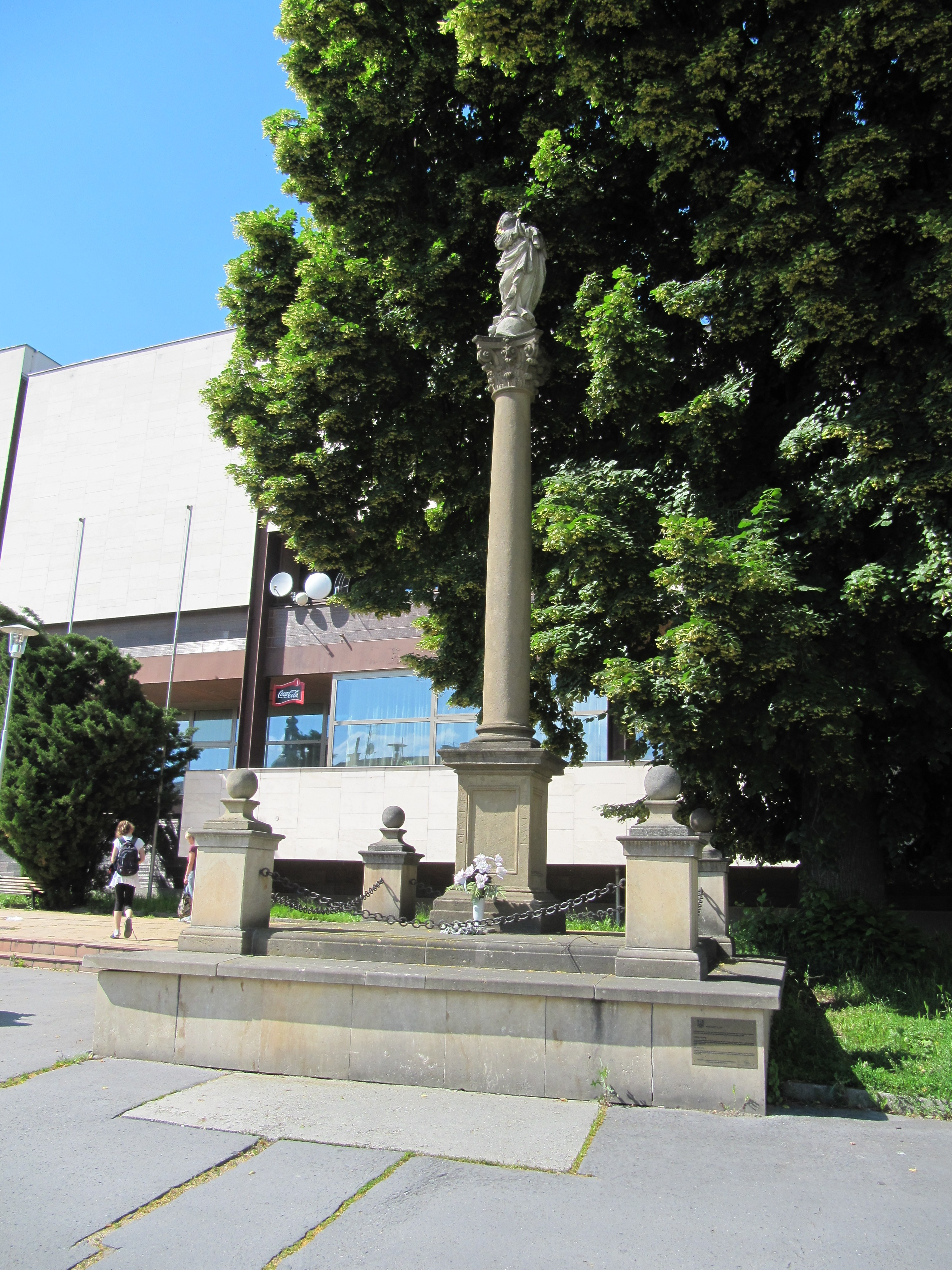 Sloup se sochou P. Marie (Uherský Brod), Mariánské náměstí, Uherský Brod